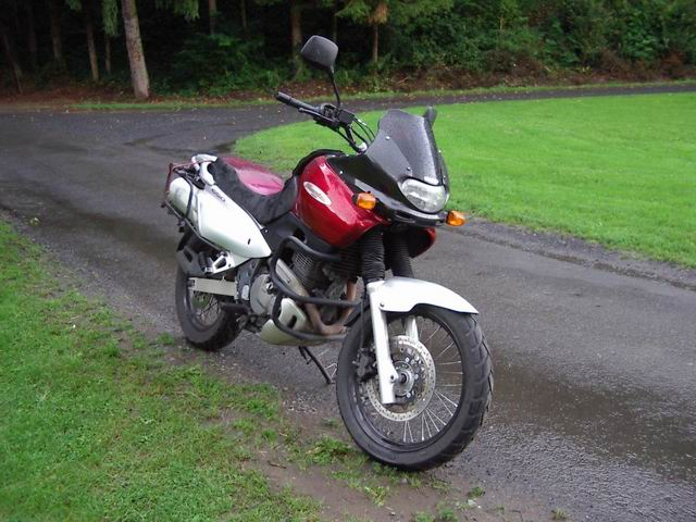 Suzuki XF650 Freewind